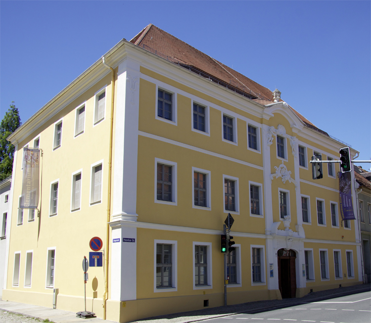 Außenansicht des Elementariums des Museum der Westlausitz in Kamenz